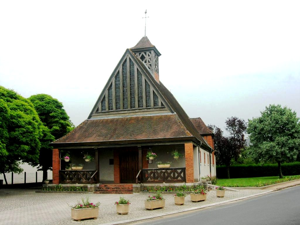 eglise de saint pere sur loire